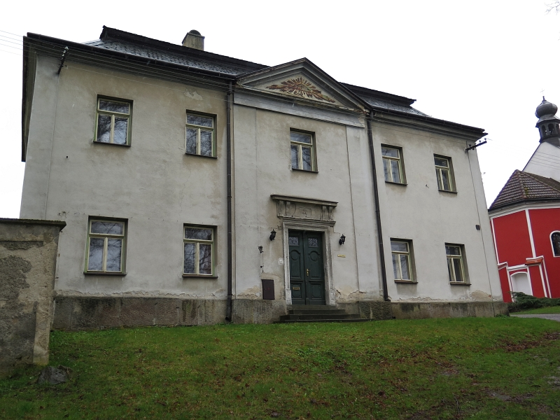 Fara, Úsobí 27, náměstí, Úsobí.